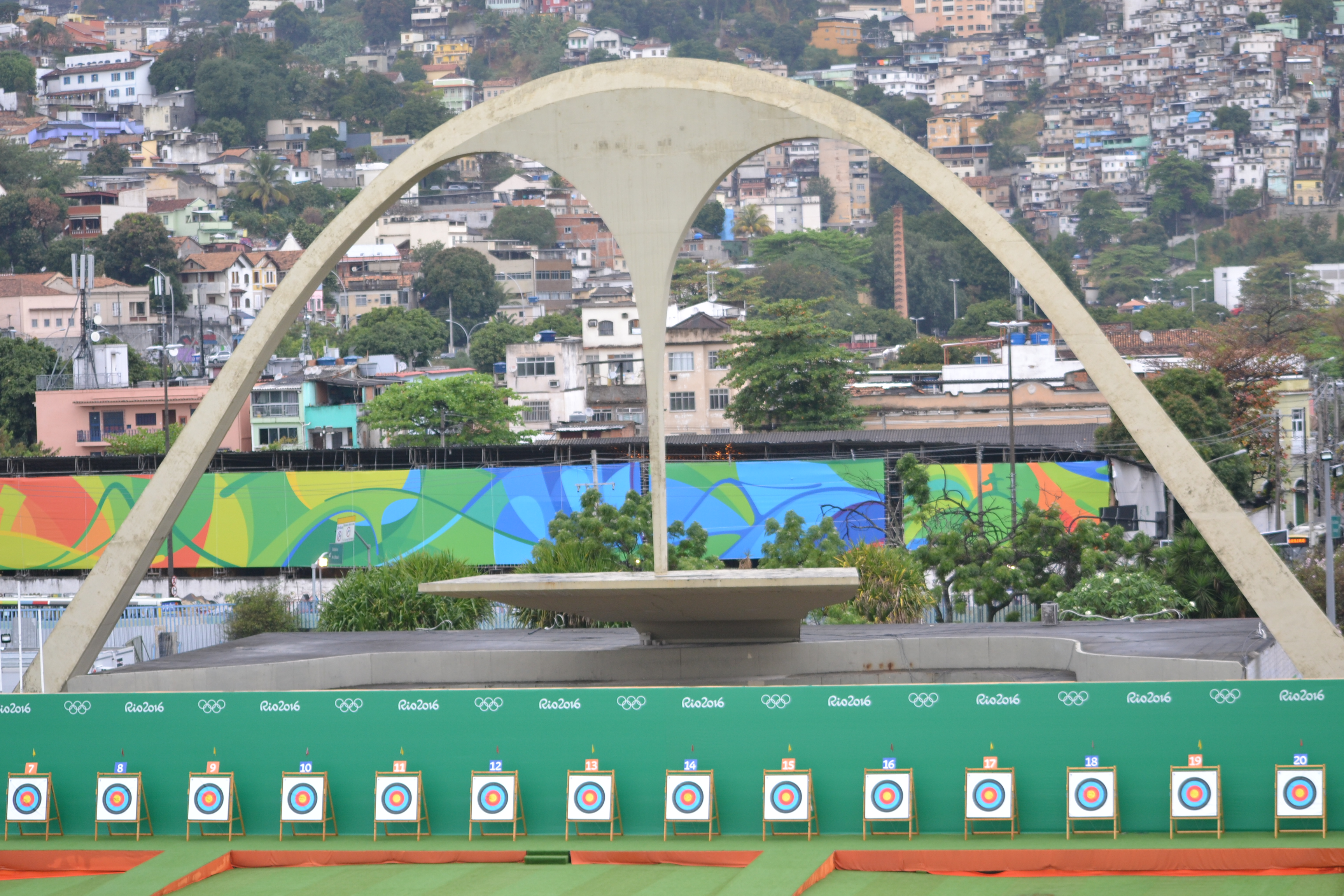 Apoteose do Sambodromo